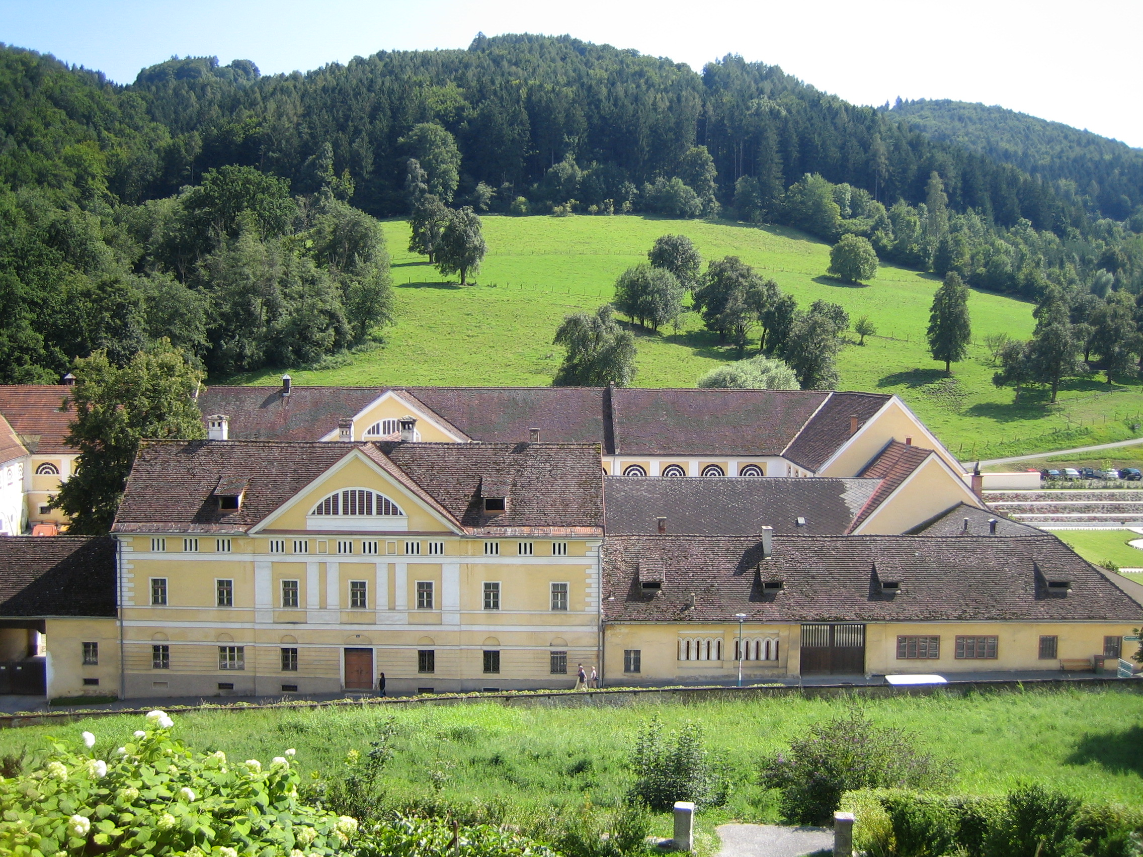 Meierhof (Wirtschaftsgebäude) südlich des Stifts St. Paul im Lavanttal